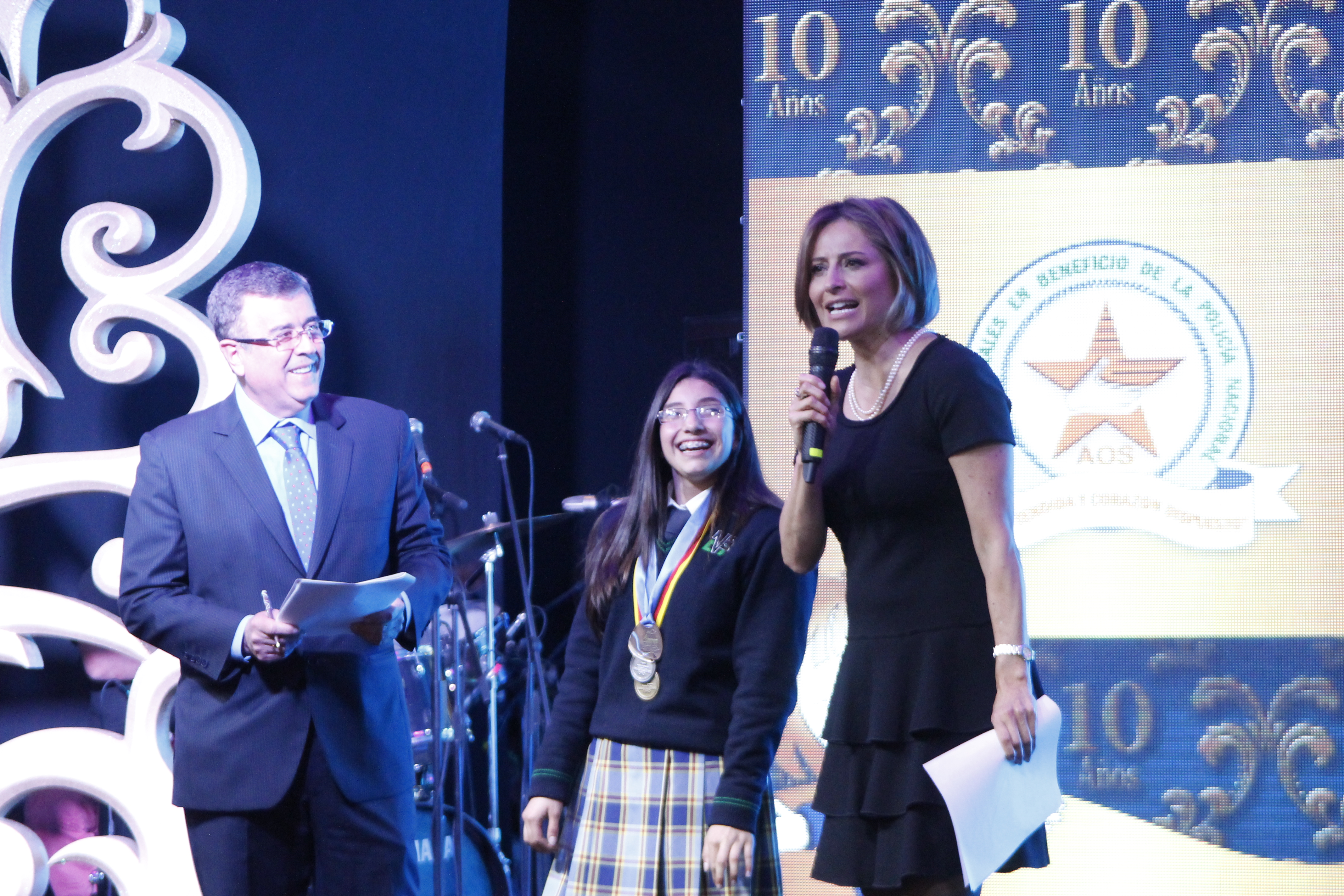 Décimo aniversario de “Café por un Futuro”